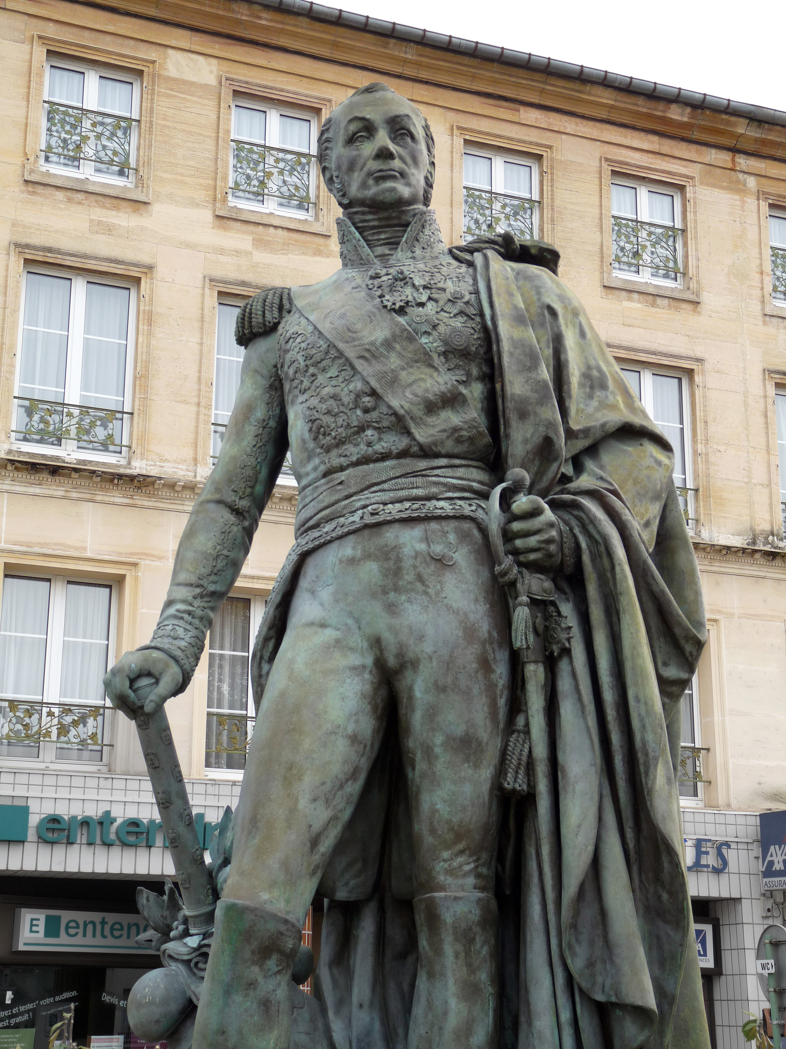 Bar-le-Duc, place Reggio : Monument en bronze au général Oudinot (Nicolas-Charles) par Jean-Baptiste Debay fils (1802-1862).